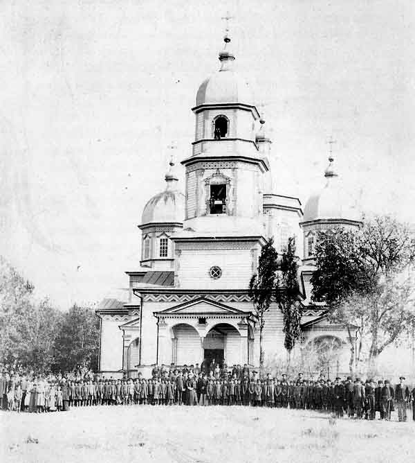 Підлипенська Свято-Миколаївська церква в старі часи